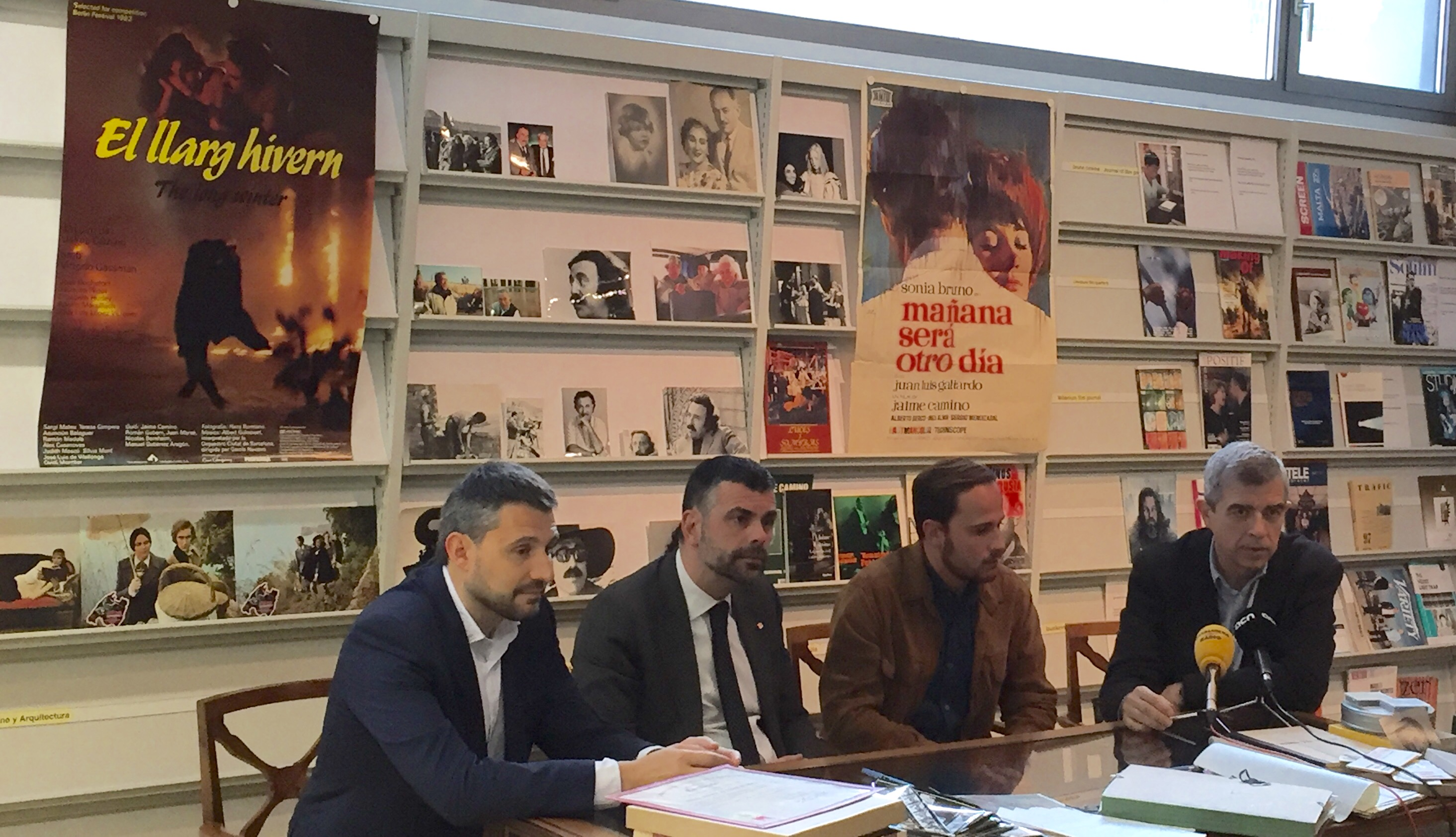 11 d’abril 2016. Acte de donació del fons documental del realitzador Jaime Camino a la Filmoteca de Catalunya El conseller de Cultura, Santi Vila, assisteix a l’acte de formalització de la donació del fons documental del director de cine i guionista Jaime Camino, que la seva família fa a la Filmoteca de Catalunya. A les 9.30 hores, a la seu de l’equipament.